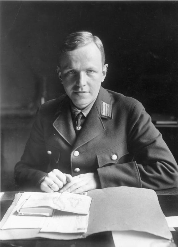 Sachverständiger für das Berufs-Beamtengesetz Der Reichsminister des Innern hat zum beauftragten Sachverständigen für die Nachprüfungen im Sinnde des § 3 des Reichsgesetzes über die Herstellung des Berufsbeamtentums Dr. Achim Gercke ernannt. Dr. Gercke wird vor allem nassgebend für die Abstammungsfragen sein. Photo: Scherls Bilderdienst, Berlin 100 13-33